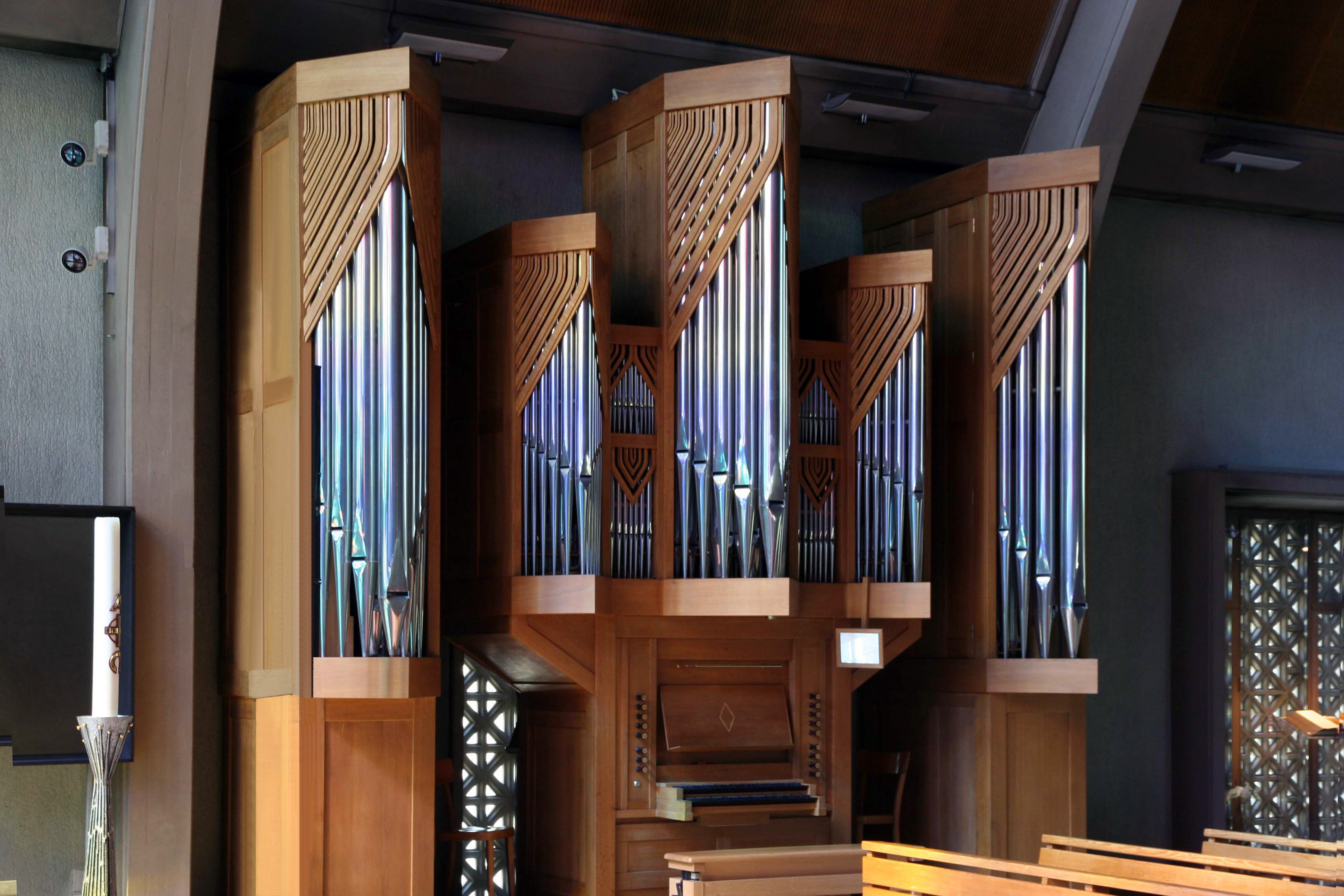 Römisch-katholische Pfarrkirche St. Marien Herrliberg